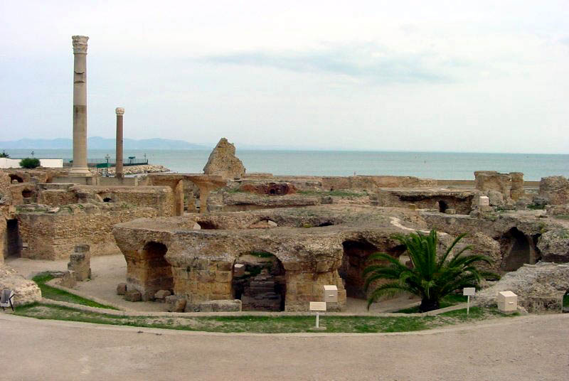 Die Ruinen von Karthago (Antoninus-Pius-Thermen) Technisch überarbeitet - Original hier.